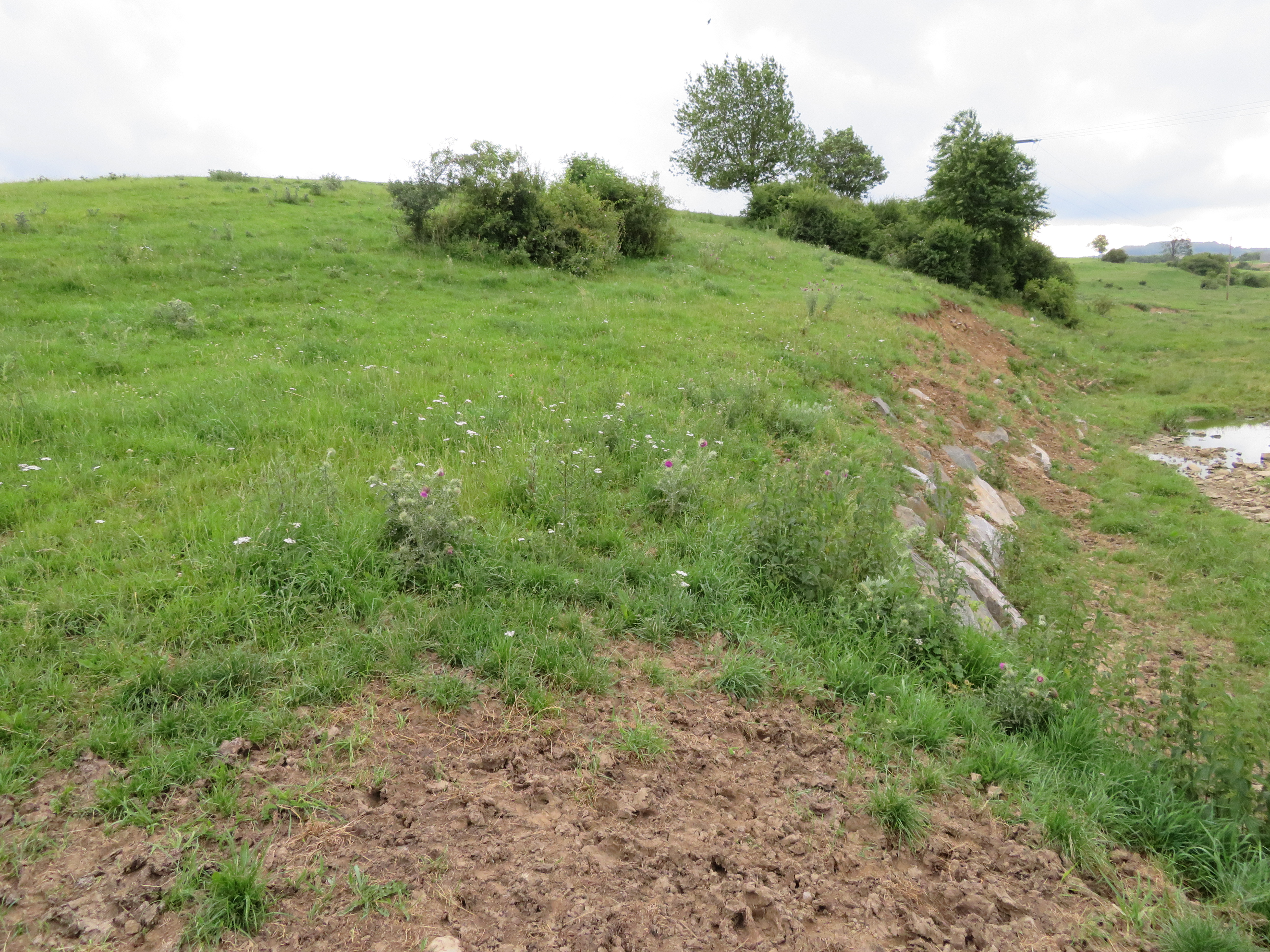 NSG Flotsberg von Straße Fünf Brücken aus nach Süden aufgenommen.